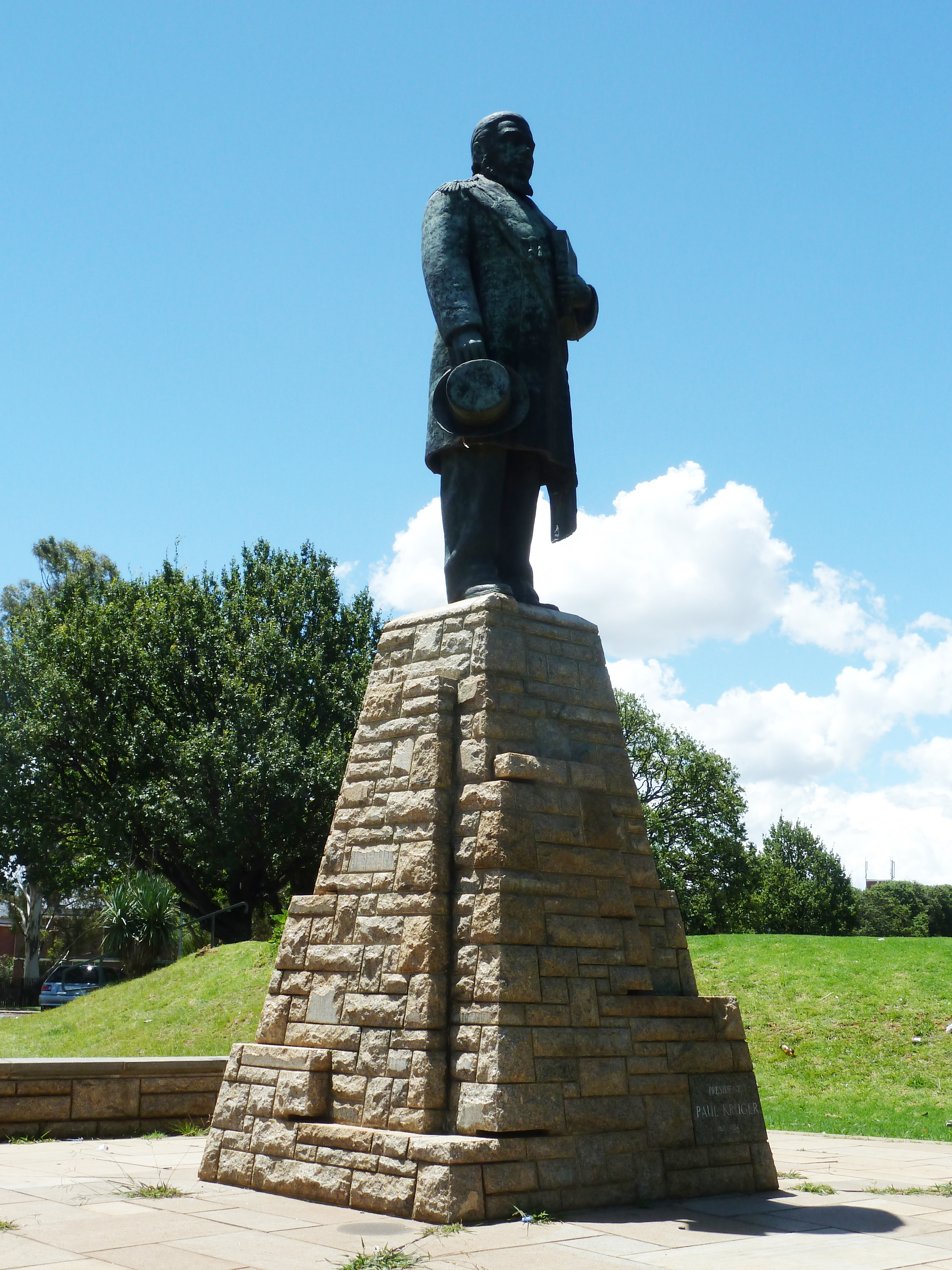 Standbeeld van Paul Kruger langs Beginstraat naby die Paardekraalmonument, Krugersdorp. Die voetstuk se hoeksteen is gelê deur Sy edele Jan de Klerk op 10 Desember 1961, en 'n jaar later is die beeld onthul deur Staatspresident C.R. Swart. Die beeldhoudster was Laurika Postma (1903-1987).